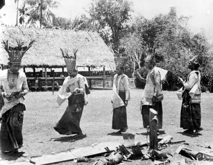 Repronegatief. Priesters voeren een dans op in kampong Bora te Biromaru, Donggala, Celebes